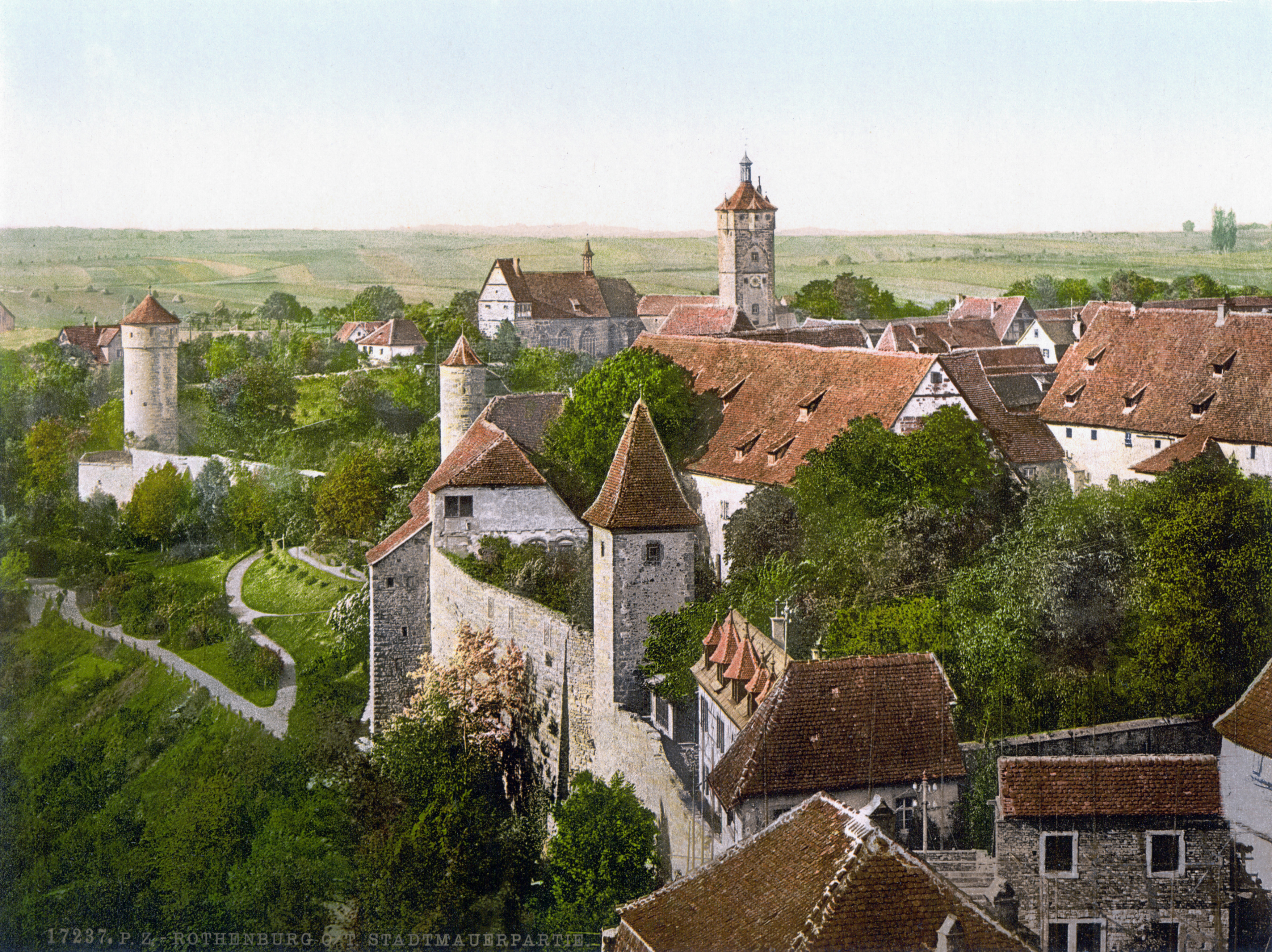 Stadtmauer Rothenburg um 1900